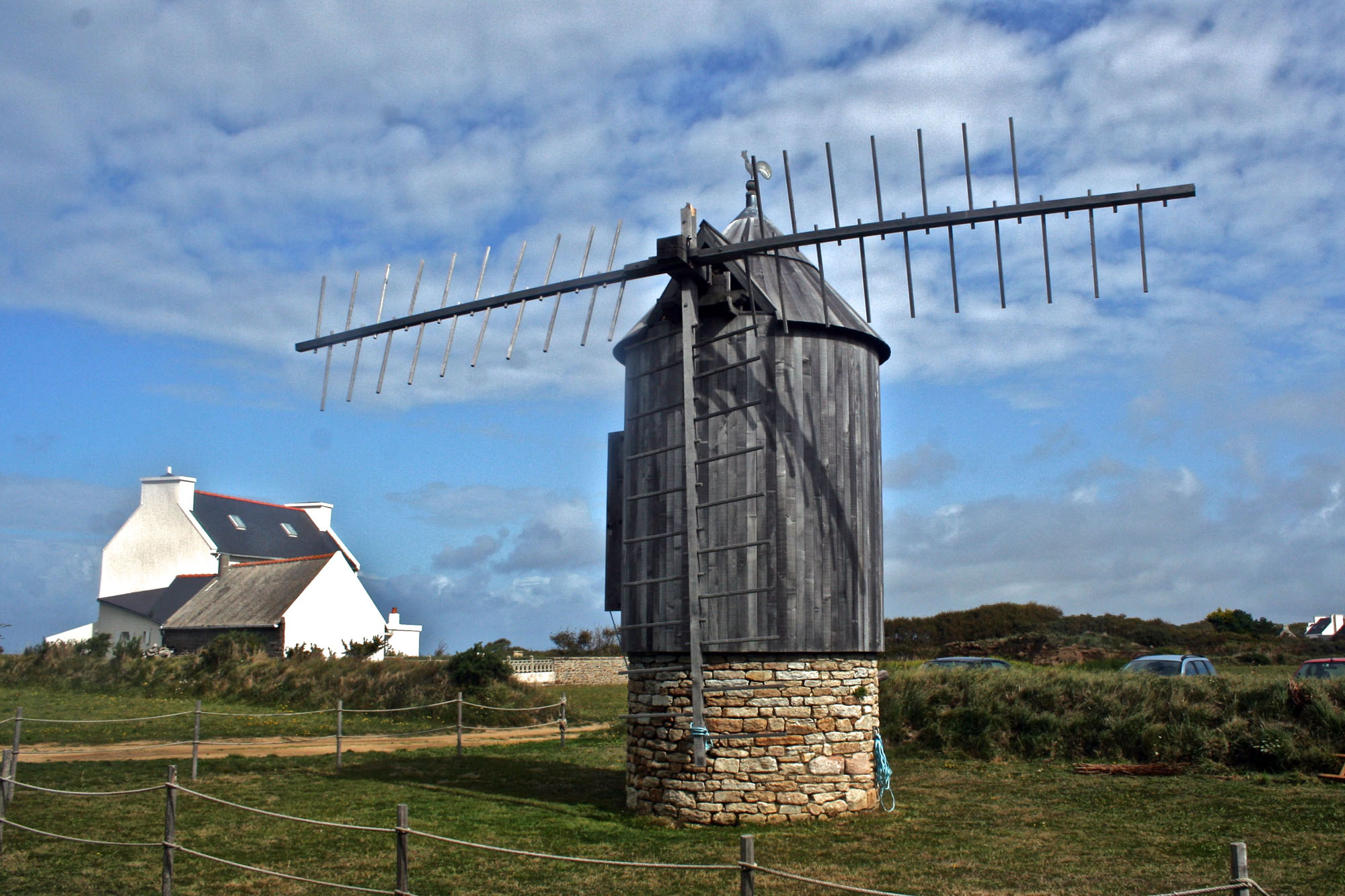 Moulin chandelier ou "kandelou" à Trouguer (Finistère, Bretagne, France). Une aile a été brisée par la tempête, photographie avant restauration.